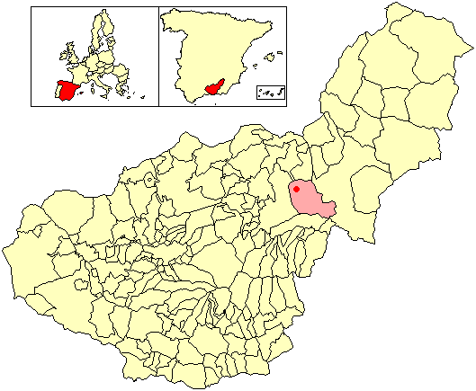 Situación de la localidad de Las Viñas (en el municipio de Gor) respecto a la provincia de Granada, en España.